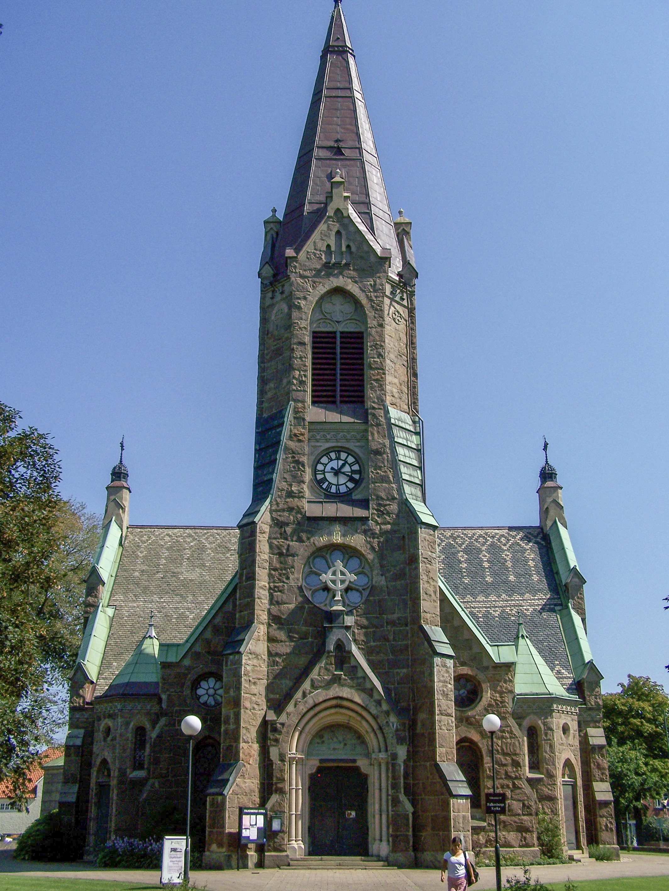 Falkenbergs kyrka (Church of Falkenberg )